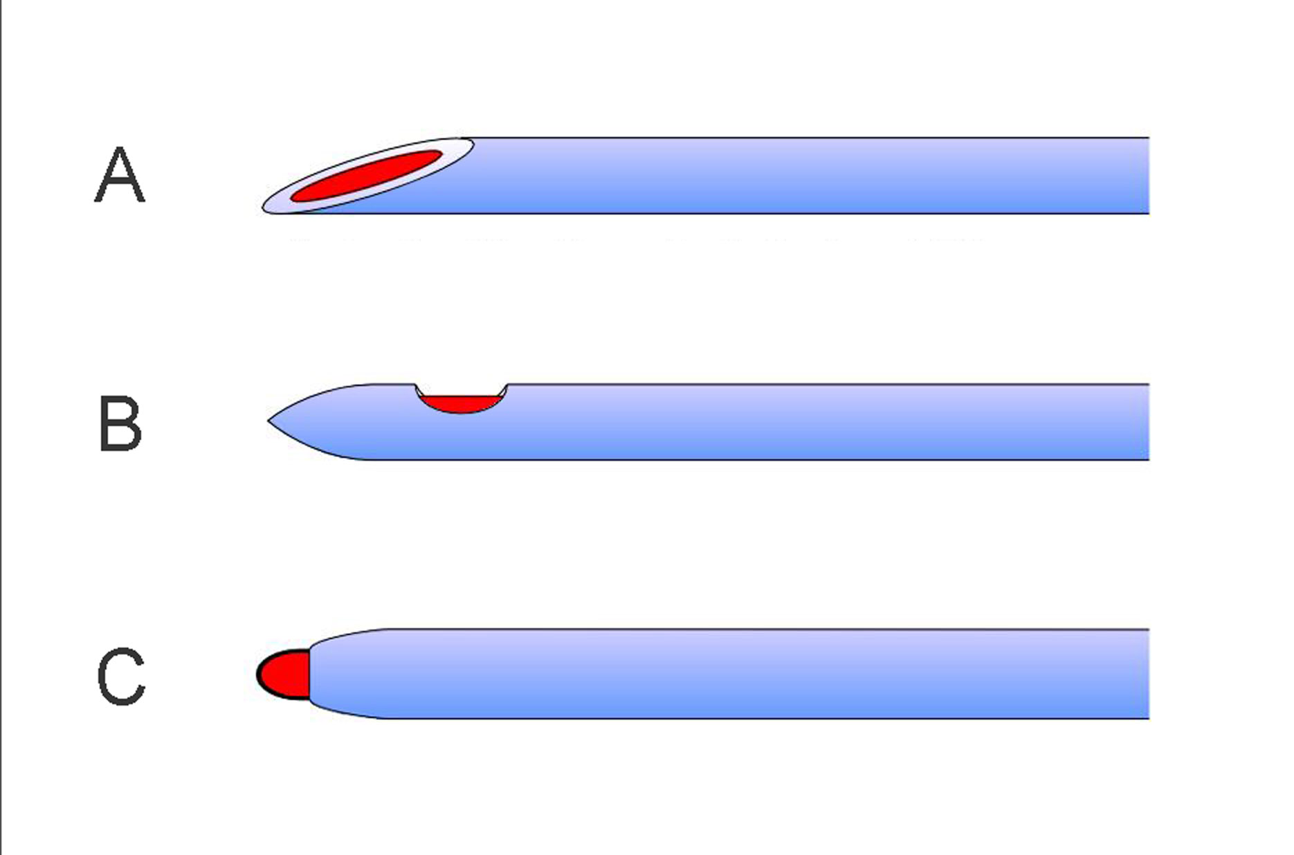 Spinalnadeln, verschiedene Typen. A. Quincke, B. Sprotte (Pencil-Point), C. Ball-Point